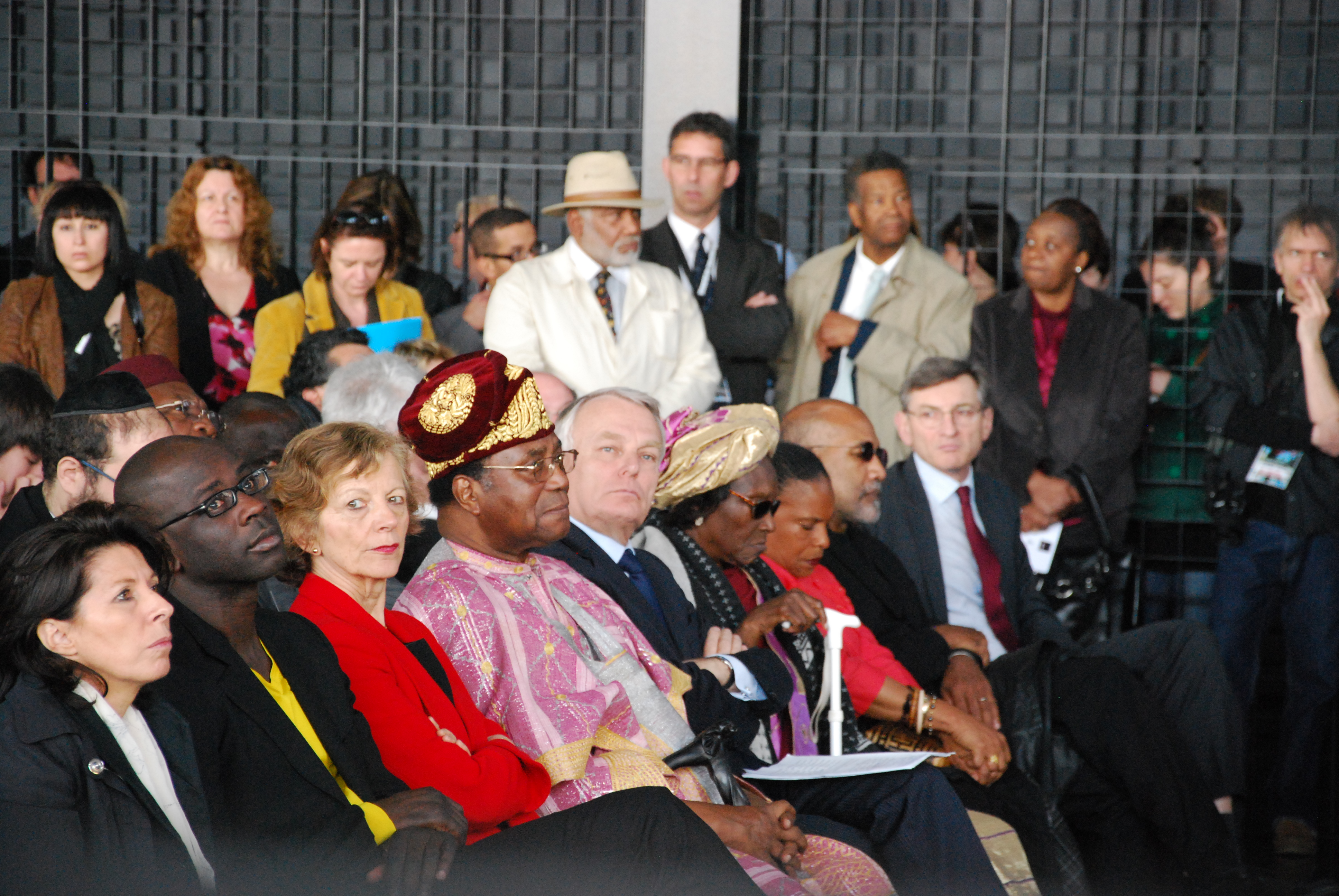 Inauguration du Mémorial de l'abolition de l'esclavage de Nantes, le 25 mars 2012.